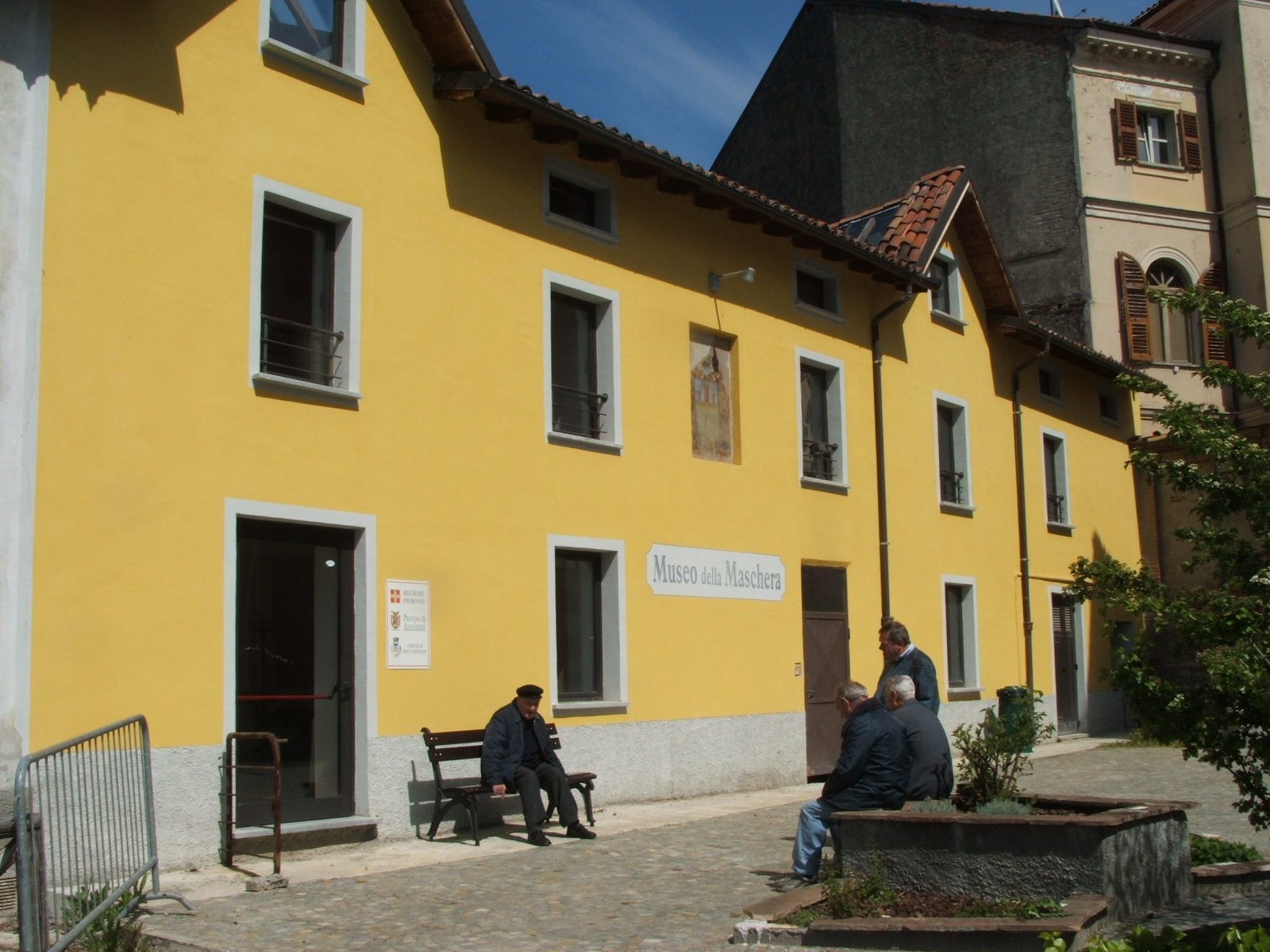 Rocca Grimalda, Alessandria, Piemonte, Italia